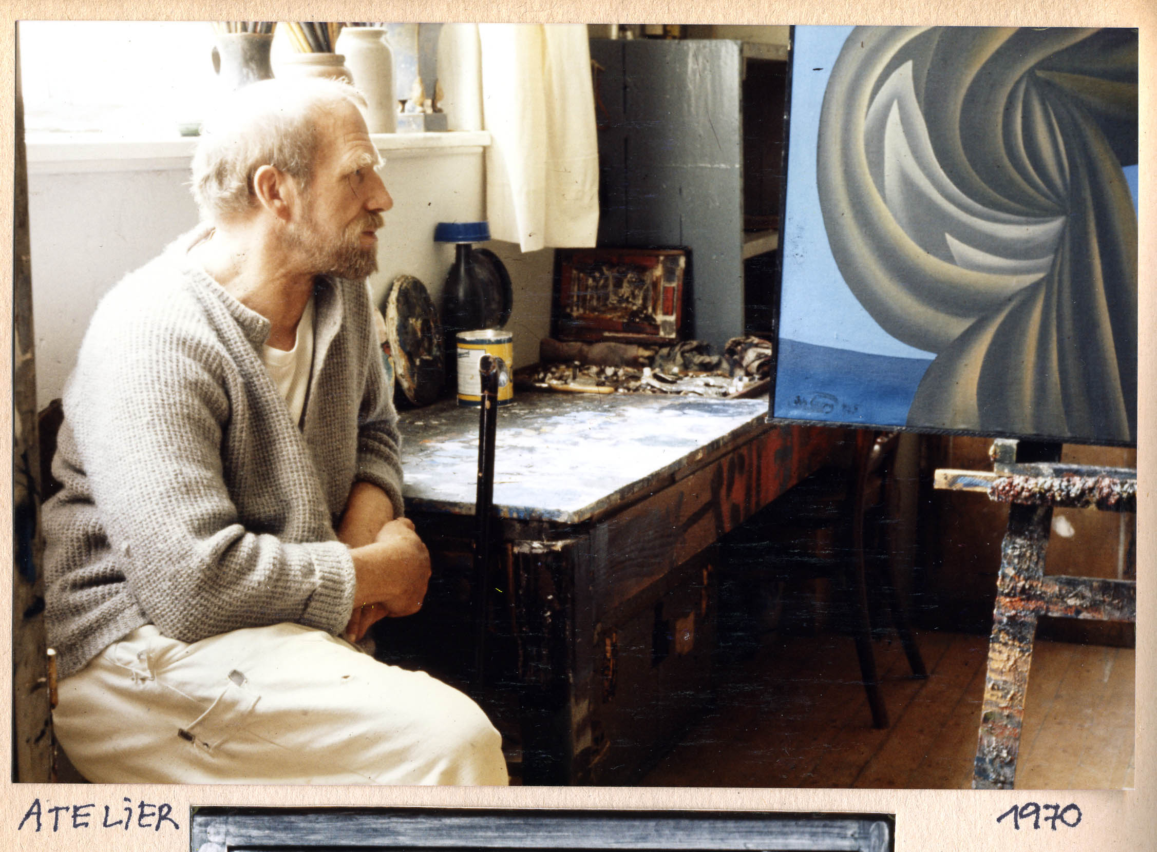 Johann Georg Müller in seinem Atelier auf dem Asterstein/ Koblenz, im Hintergrund angeschnitten das Bild 'Pflanzen am Meer' von 1965 (Werkverzeichnis M 65/1)